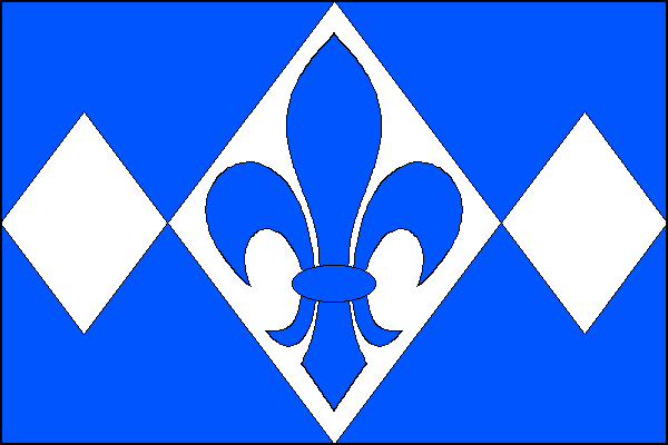 vlajka, Stříbrnice, okres Přerov